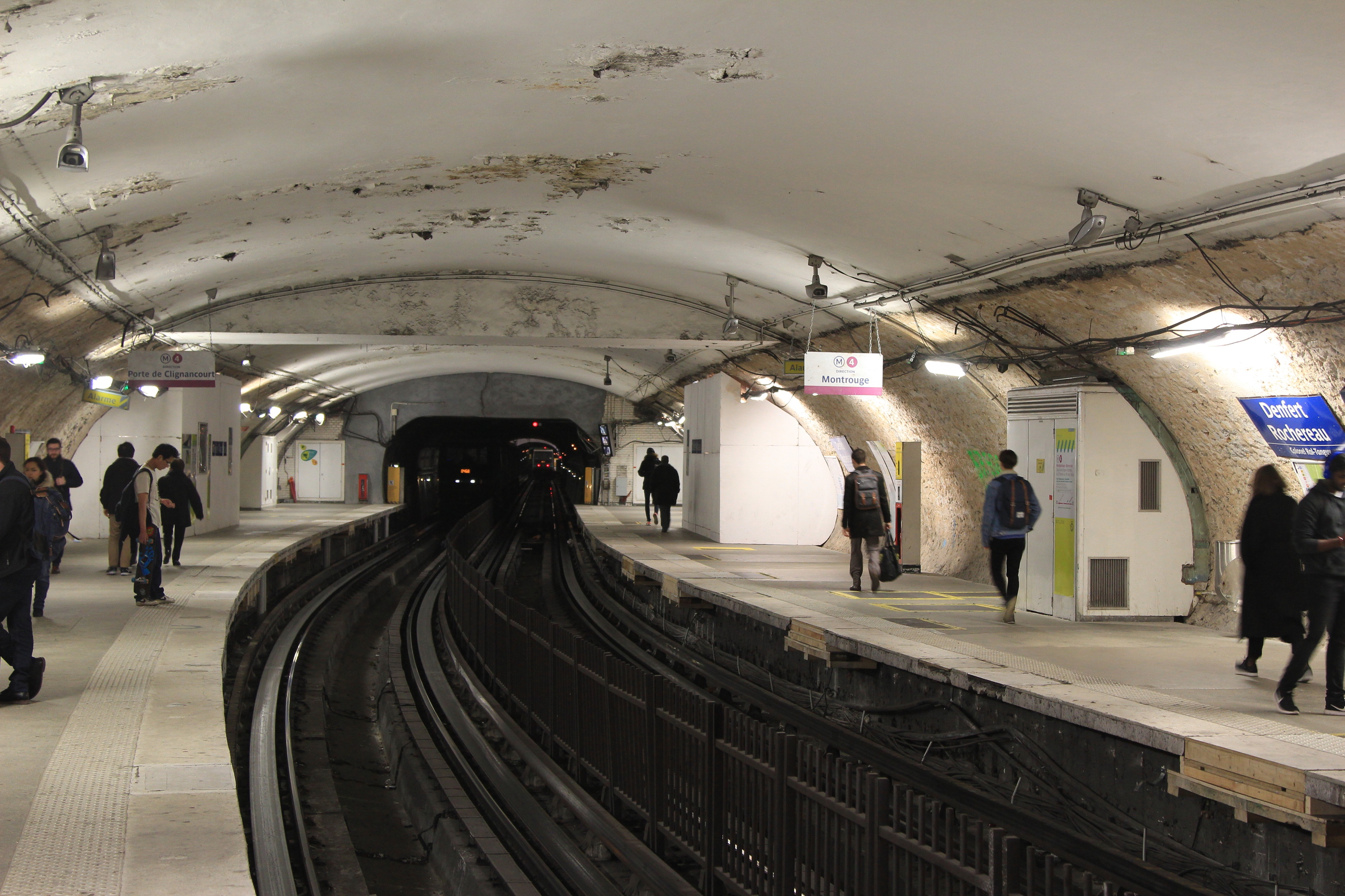 Vue des quais décarrossés de la station du métro parisien Denfert-Rochereau sur la ligne 4.